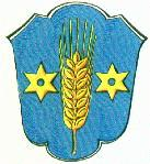 Coat of arms Berumbur, Wappen der Gemeinde Berumbur